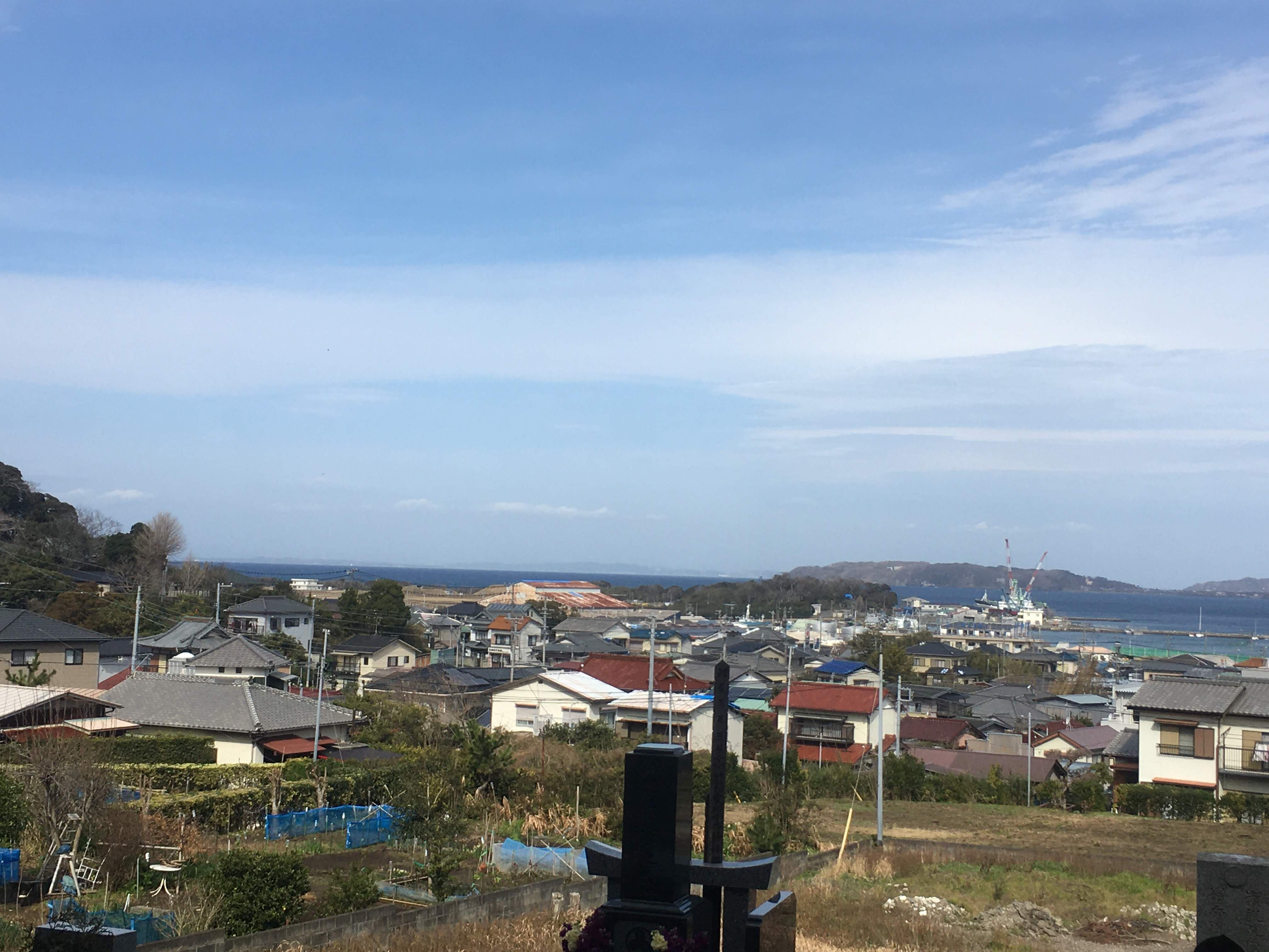 館山市高ノ島